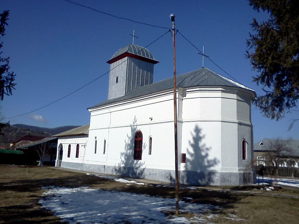 Biserica „Sf. Treime”